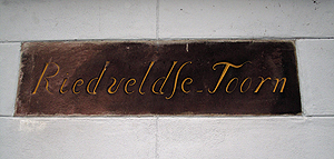 De naam op de rietveldse toren